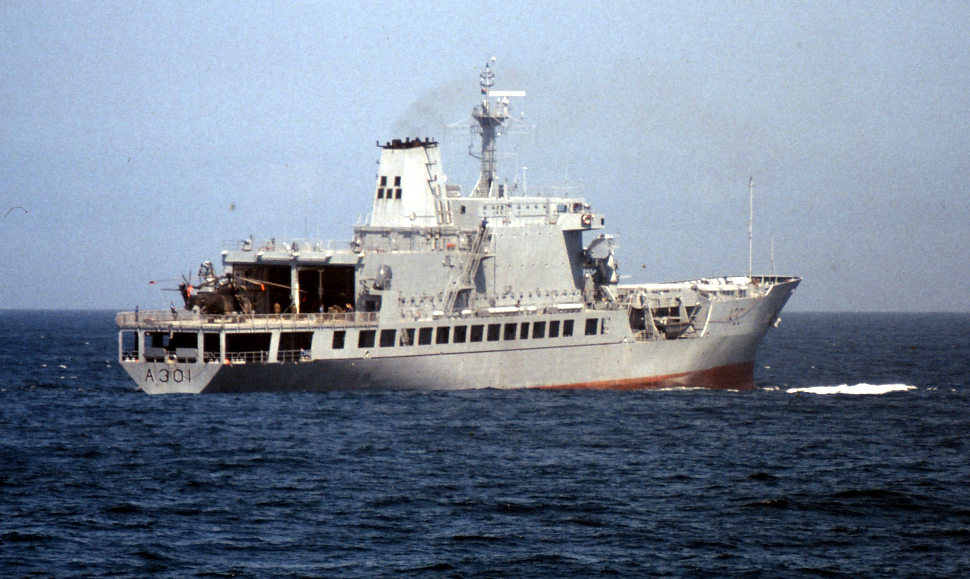 The SAS Drakensberg